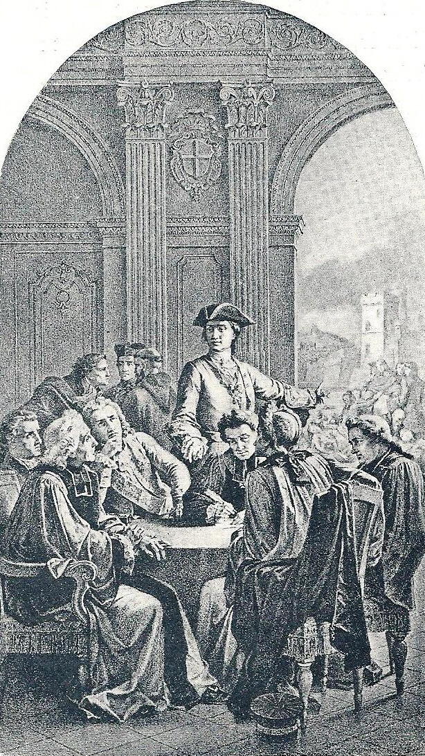 Gravure de Dominique Magaud (1817-1899) représentant le chevalier Roze avec les échevins pendant la peste de 1720.